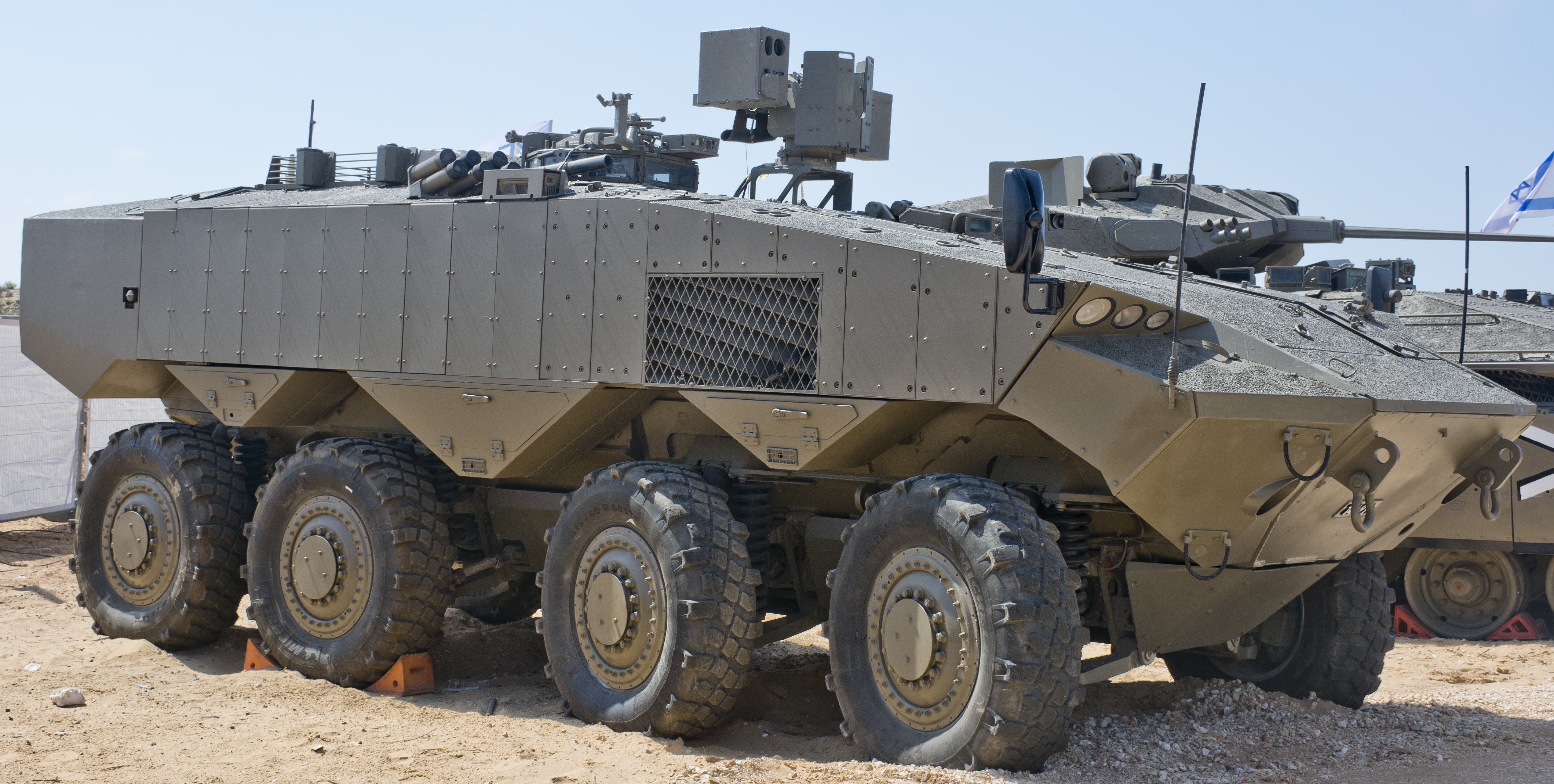 Eytan wheeled armored personnel carrier (WAPC), Our IDF 70, Israel נגמ"ש אופני "איתן", תערוכת צה"ל שלנו 70, ישראל